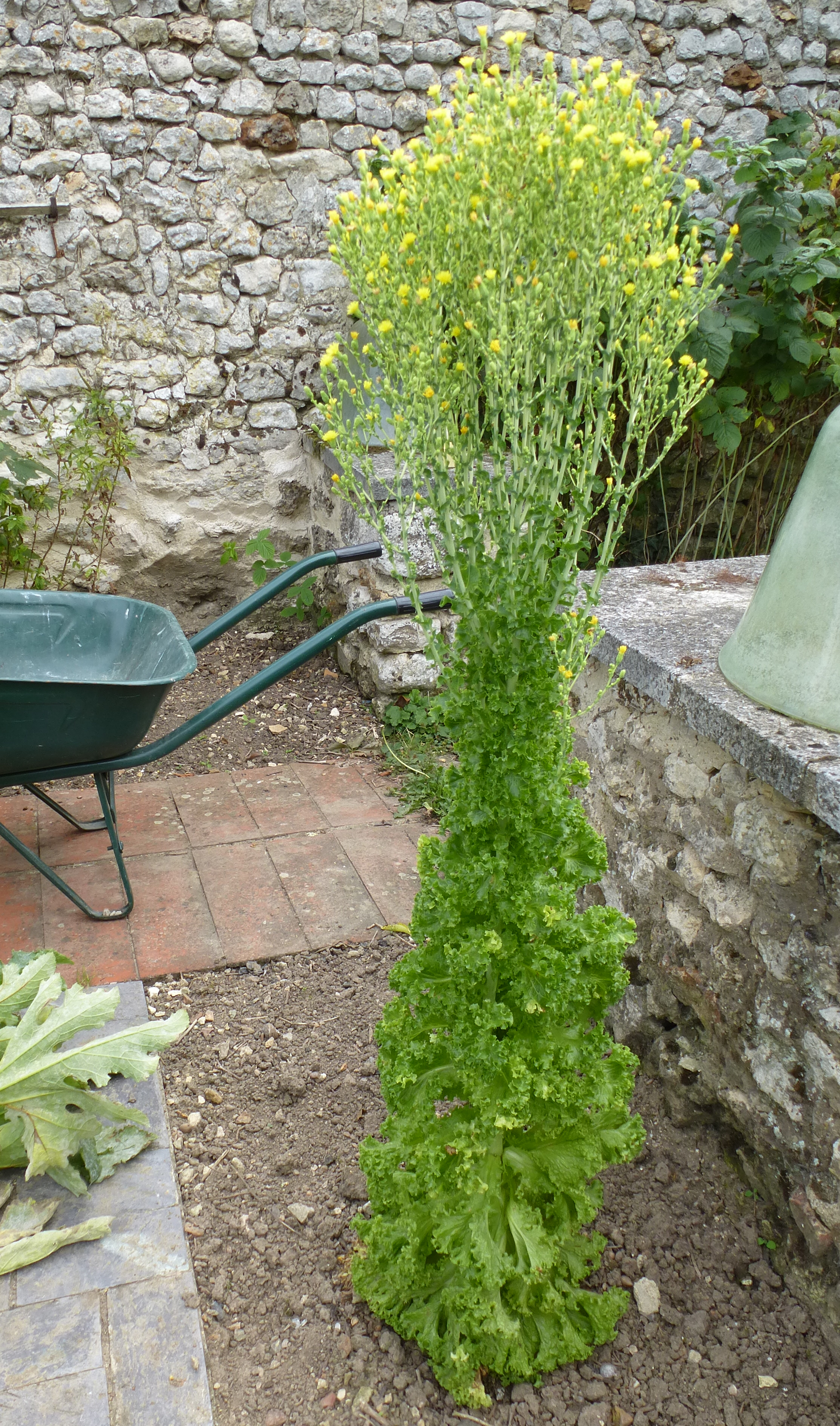 laitue (Lactuca sativa) d'une variétée frisée, en fleurs à la fin de l'été. Région Ile de france, France. Europe.